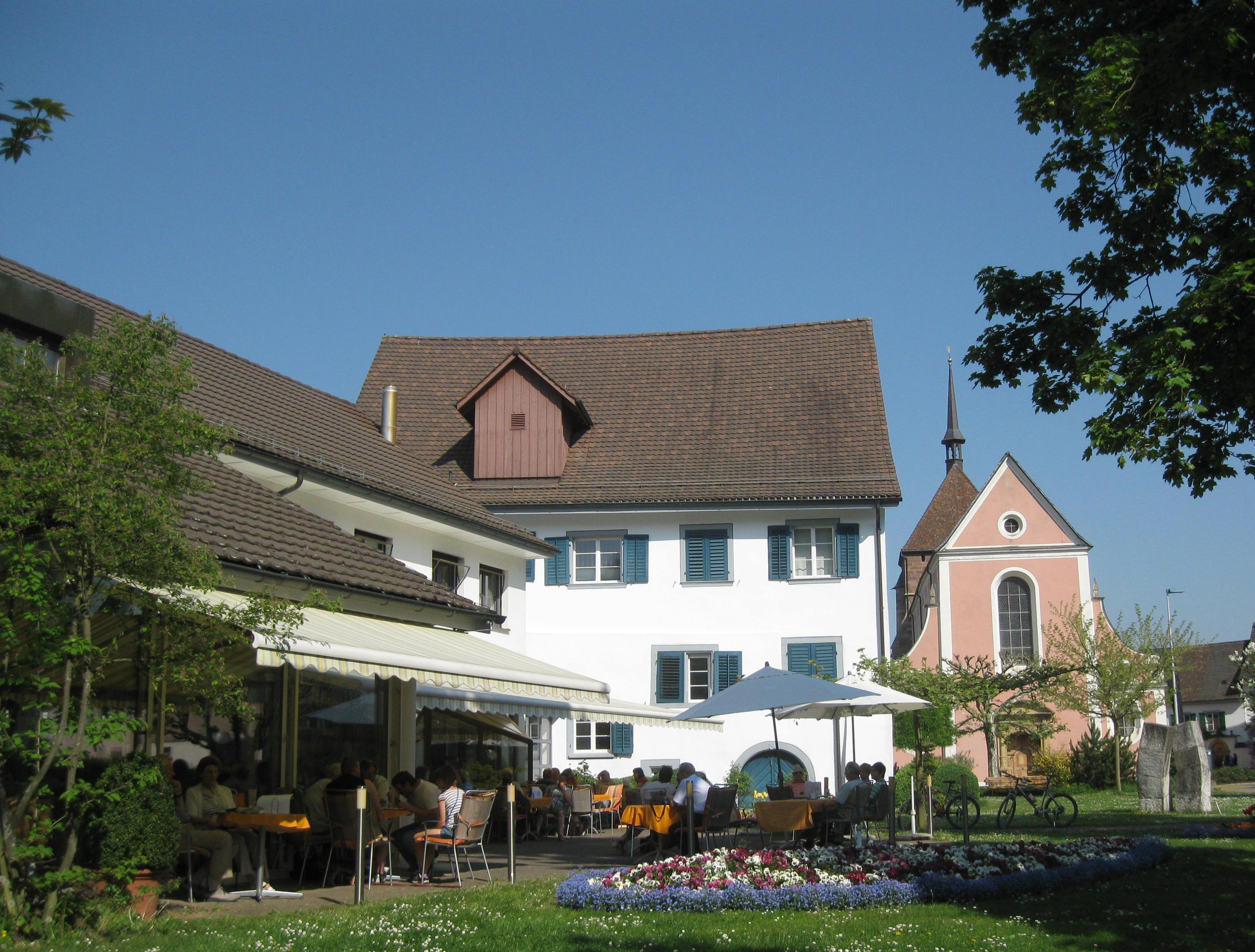 Zentrum